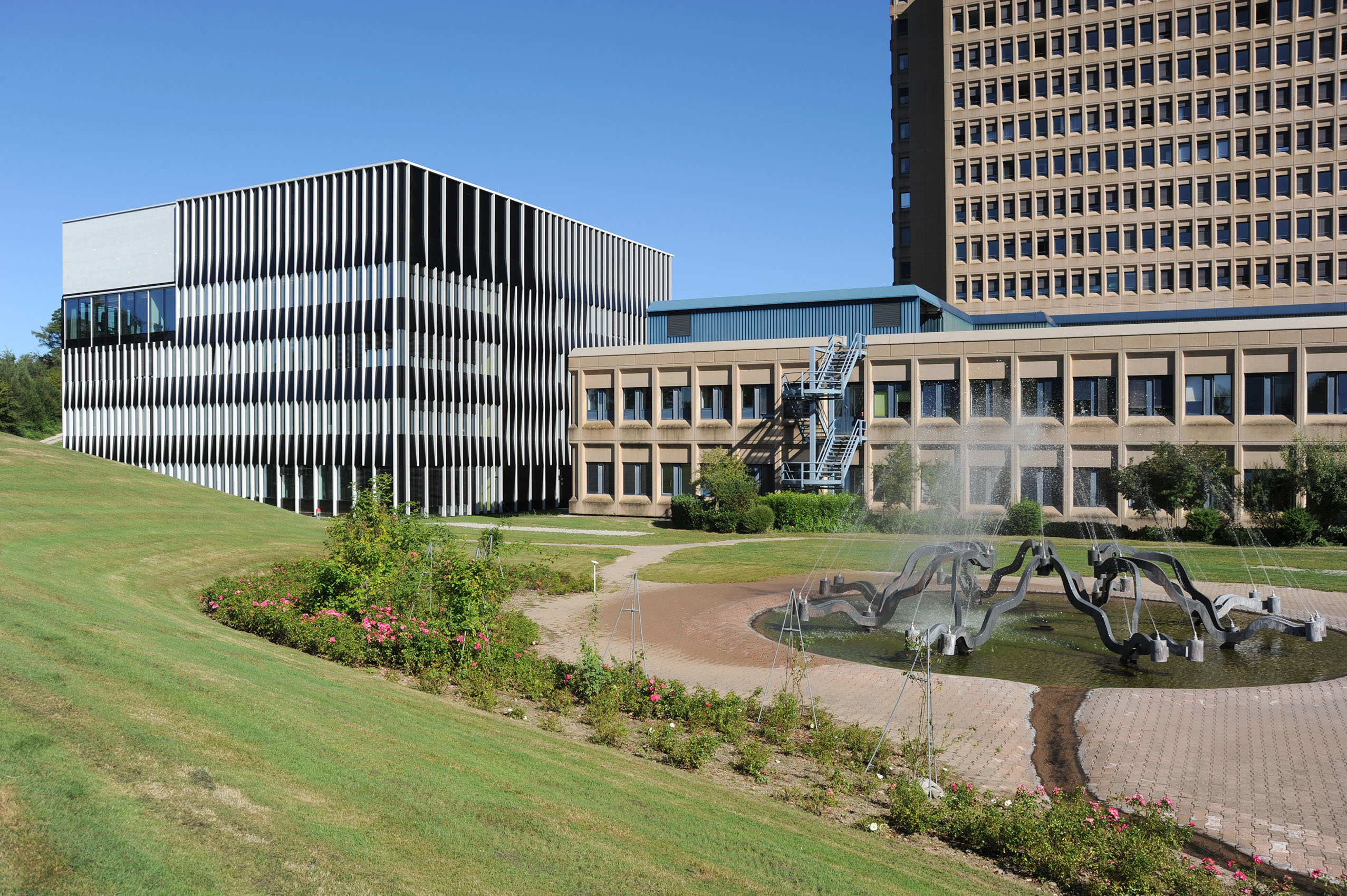 Links im Bild die Tagesklinik 'Kubus', rechts das Hauptgebäude. Im Vordergrund der Südpark des KSB.